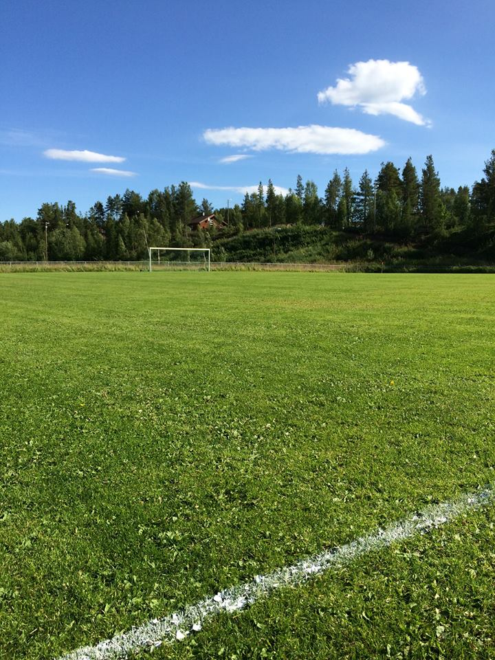 Stadion